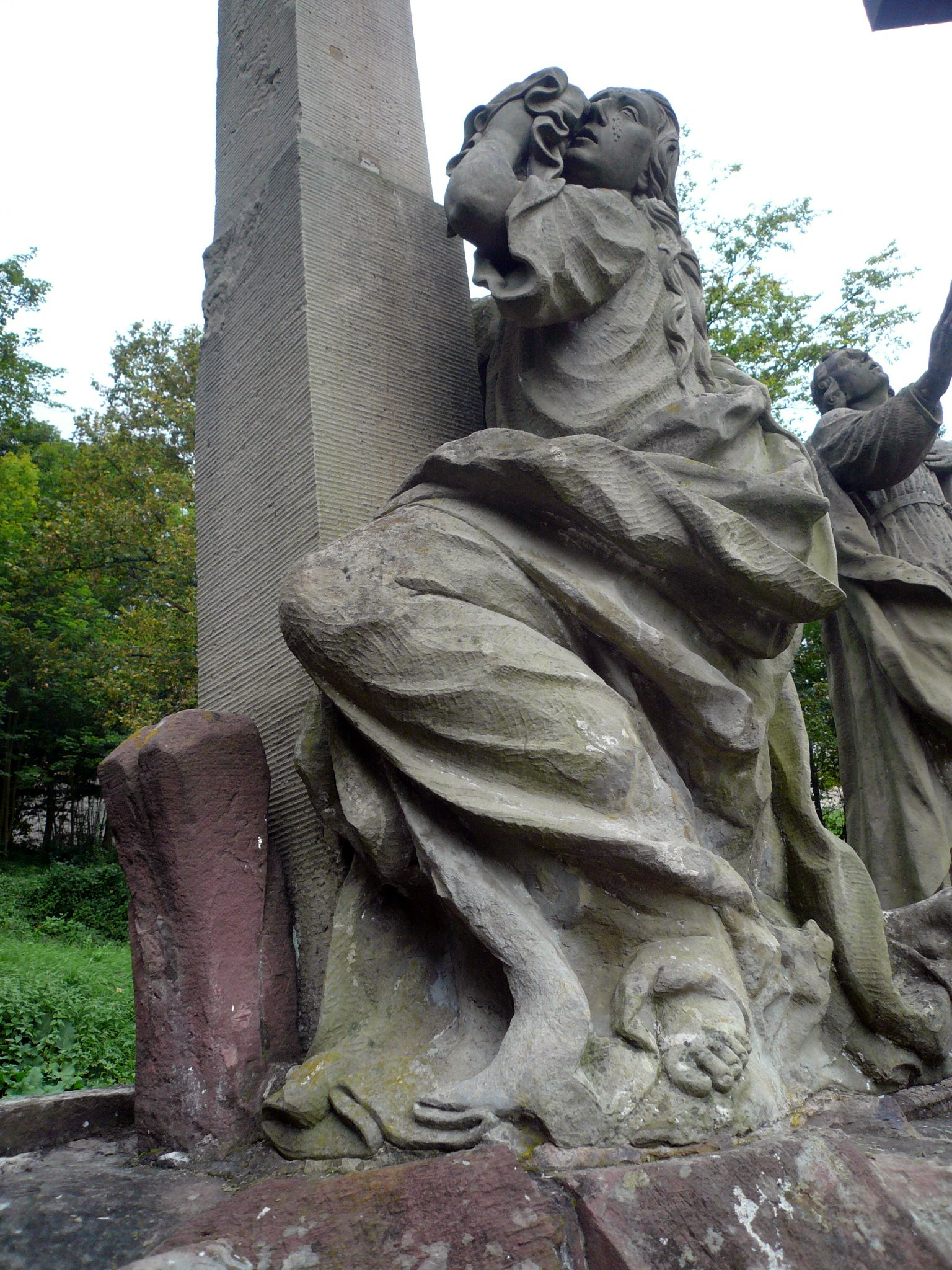 Kapellenkreuzweg Kloster Altstadt, Station 12